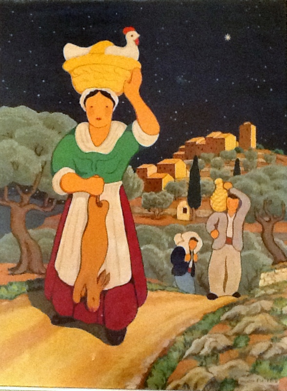 Marguarido